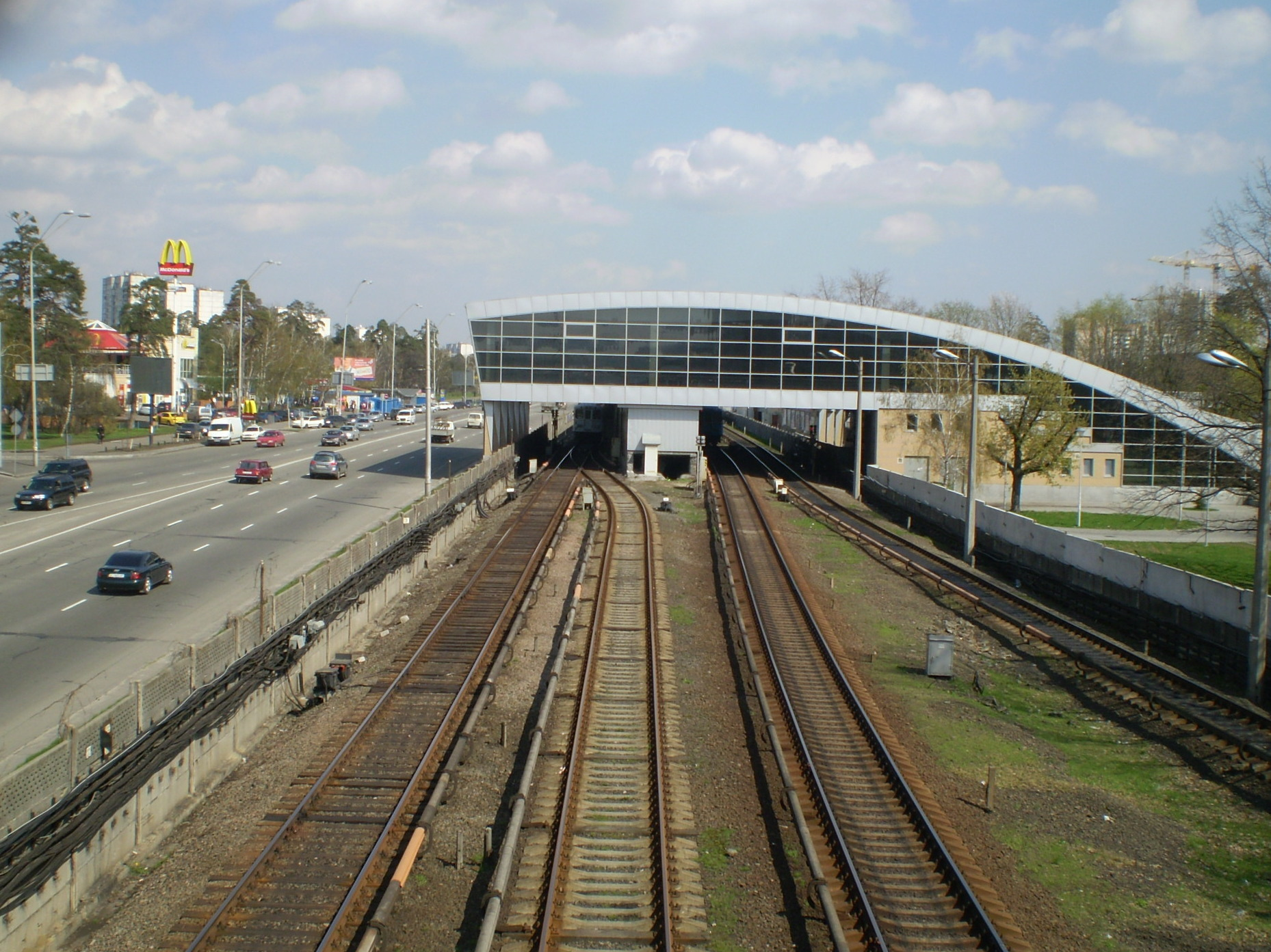 Метро "Дарниця" після реконструкції, вид з моста